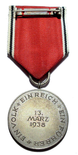 German Anschluss medal